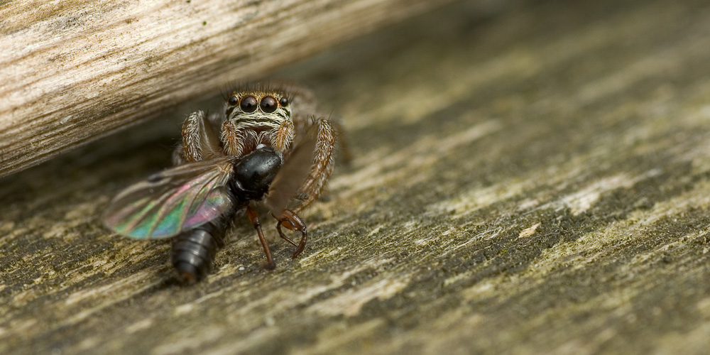 Springspinne, erfolgreicher Jäger